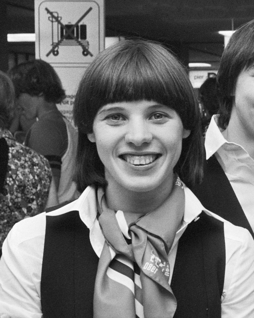 Vertrek gedeelte Olympische atletiekploeg van Schiphol naar Moskou. Els Vader